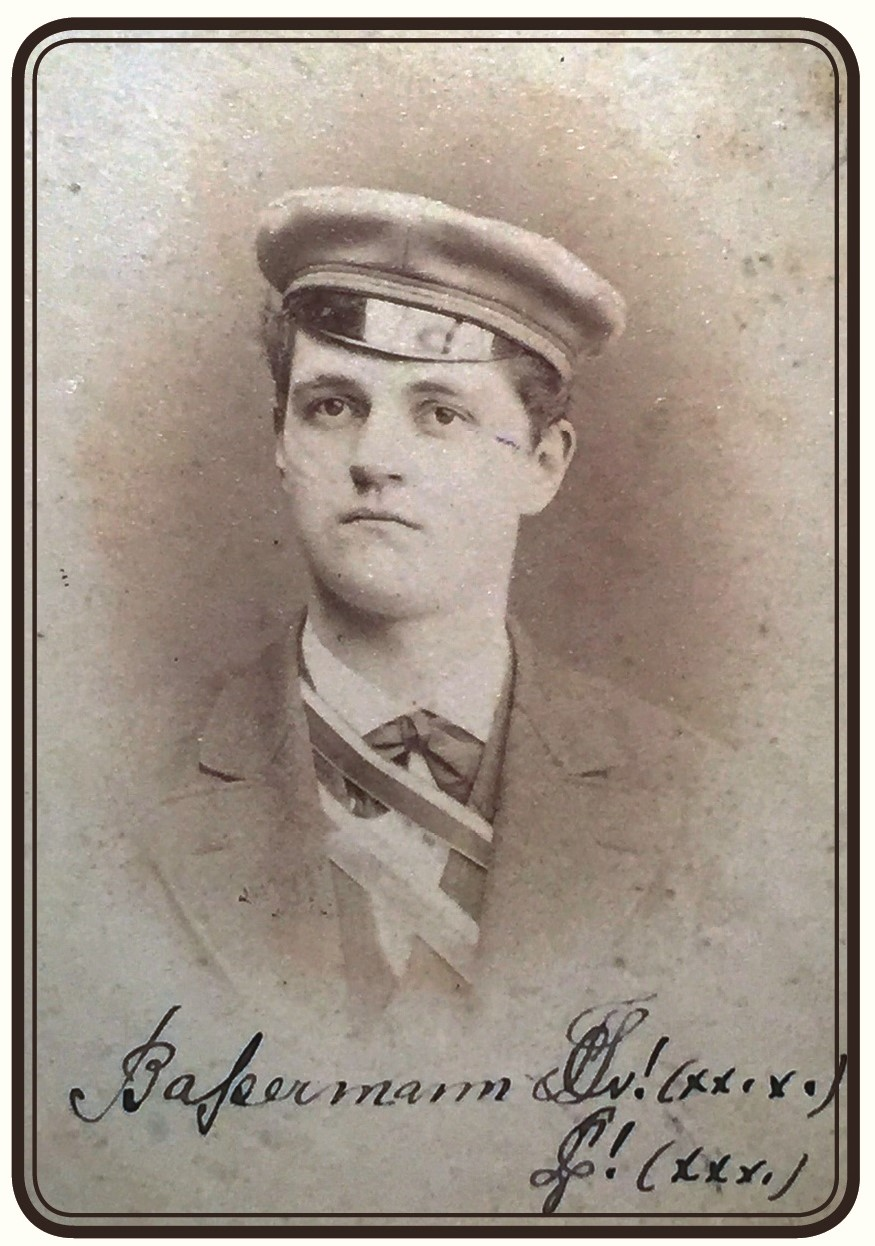 Porträtfotografie von Ernst Bassermann